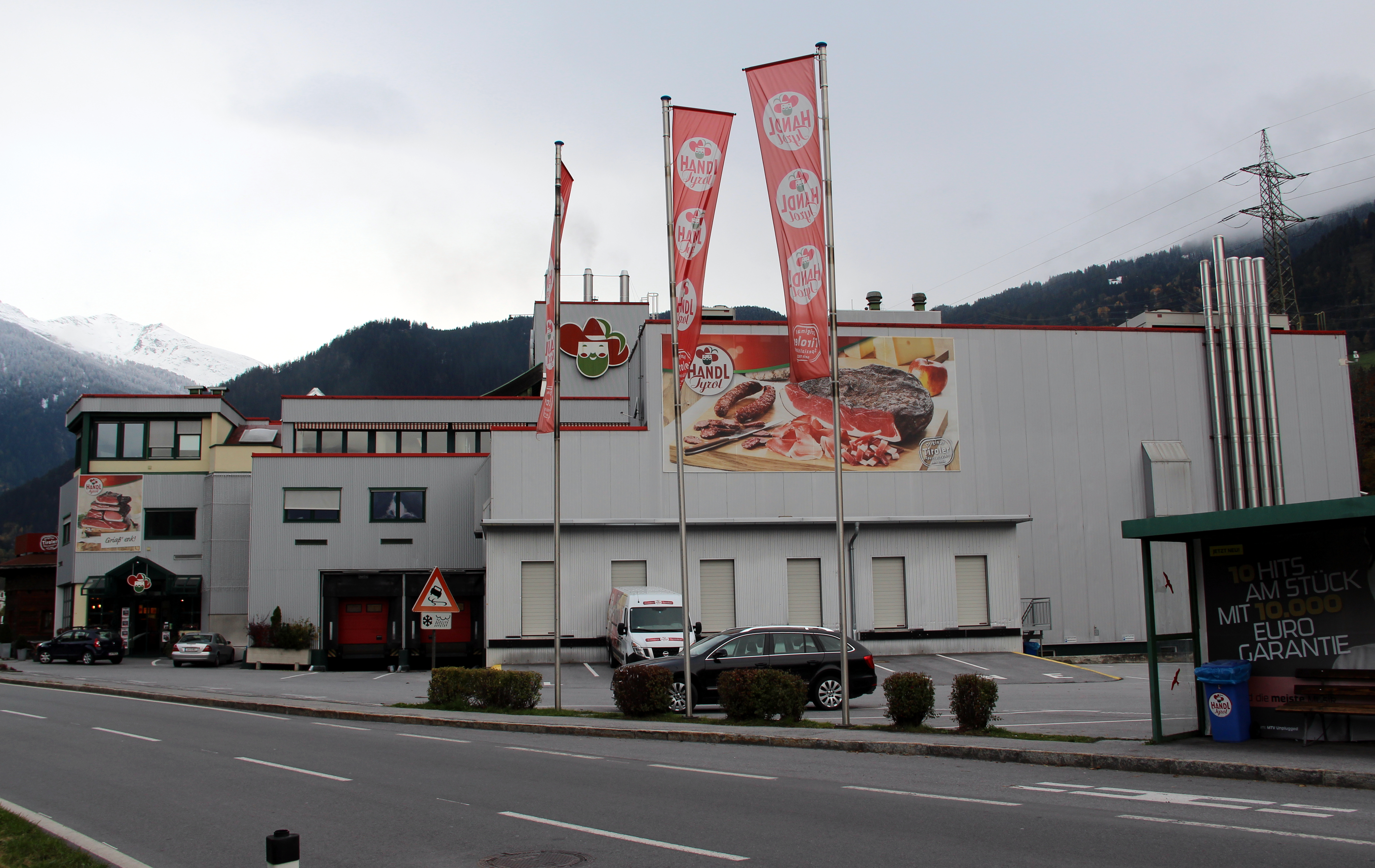 Hauptsitz der Firma Handl Tyrol in Pians, Tirol, an der Tiroler Straße (B 171)